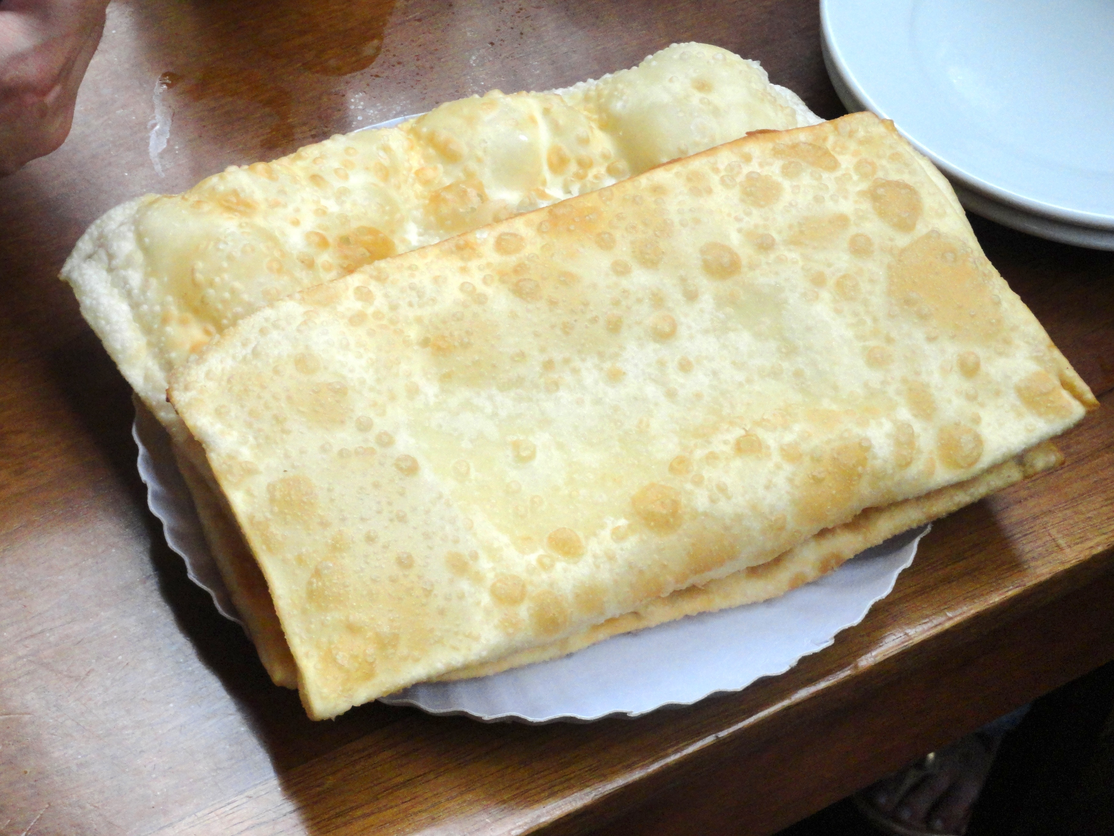 Pastéis